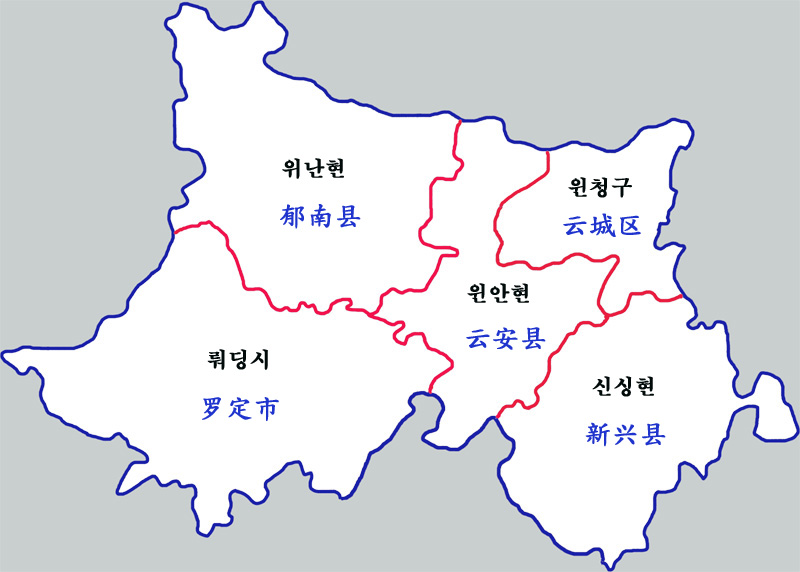 윈푸시현급구역도